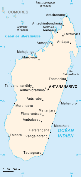 (fr) Carte du Madagascar (mg) Saritan'i Madagasikara